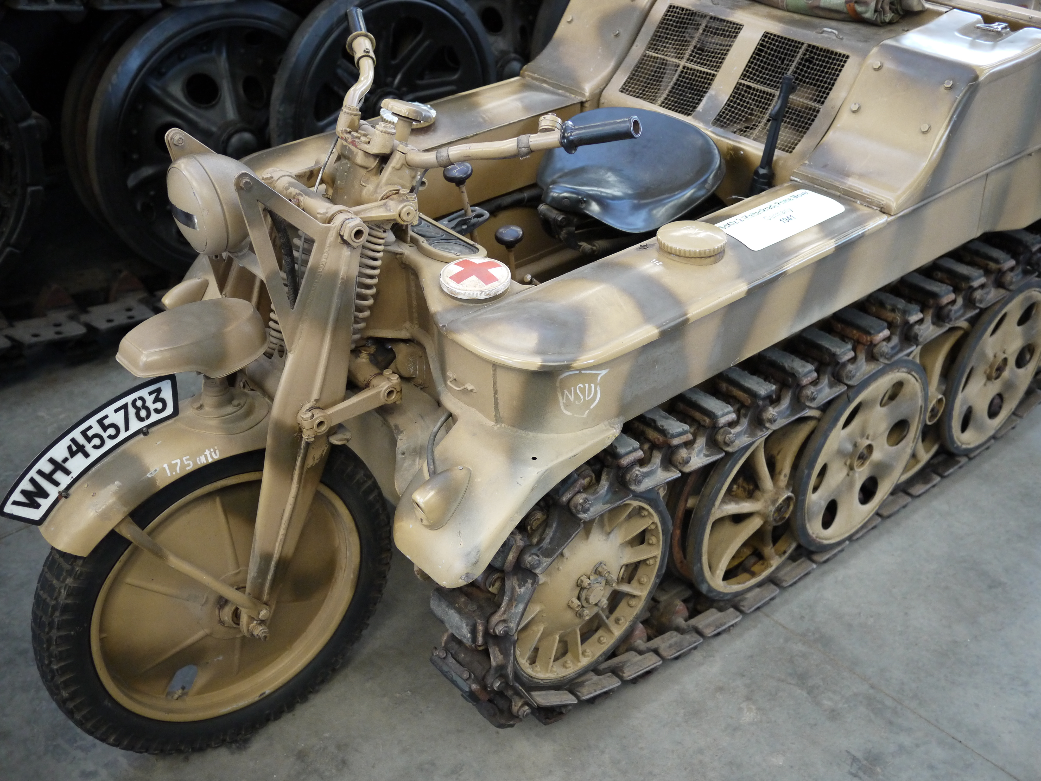 Kleines Kettenkraftrad HK101